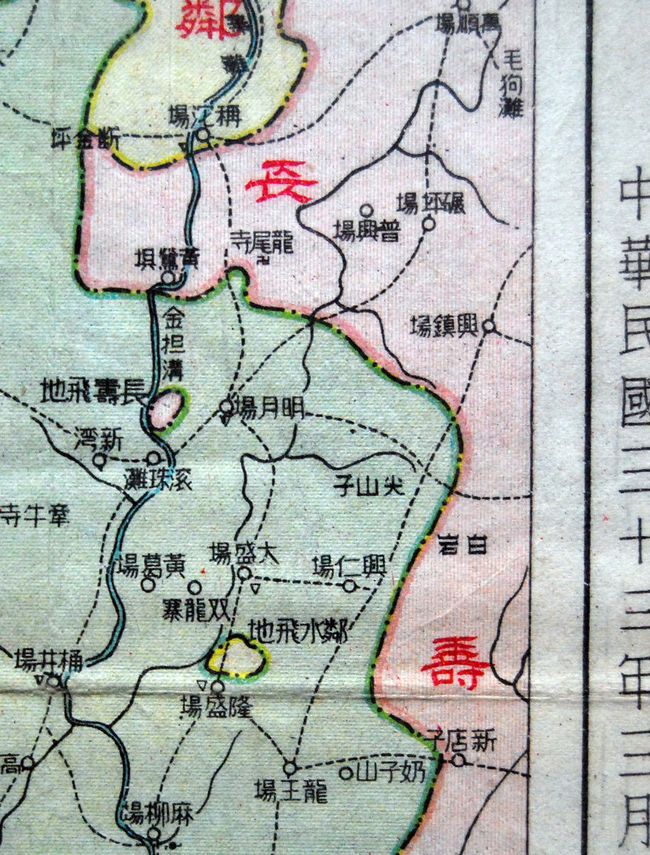 中文（台灣）: 四川省鄰水縣及長壽縣（今重慶市長壽區）在江北縣（今重慶市渝北區）境內的飛地